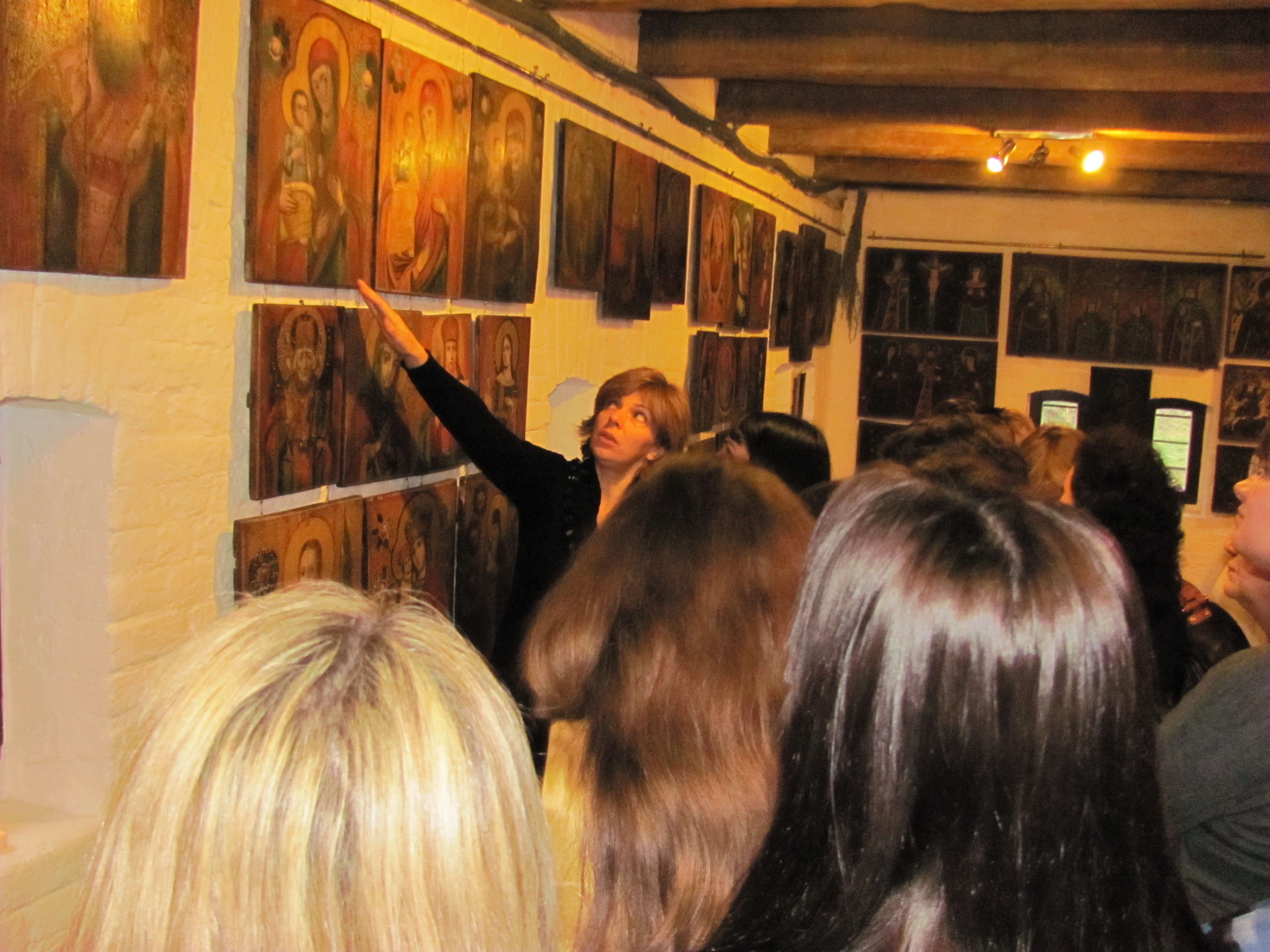 Ольга Богомолец проводит экскурсию по залам созданного ею музея